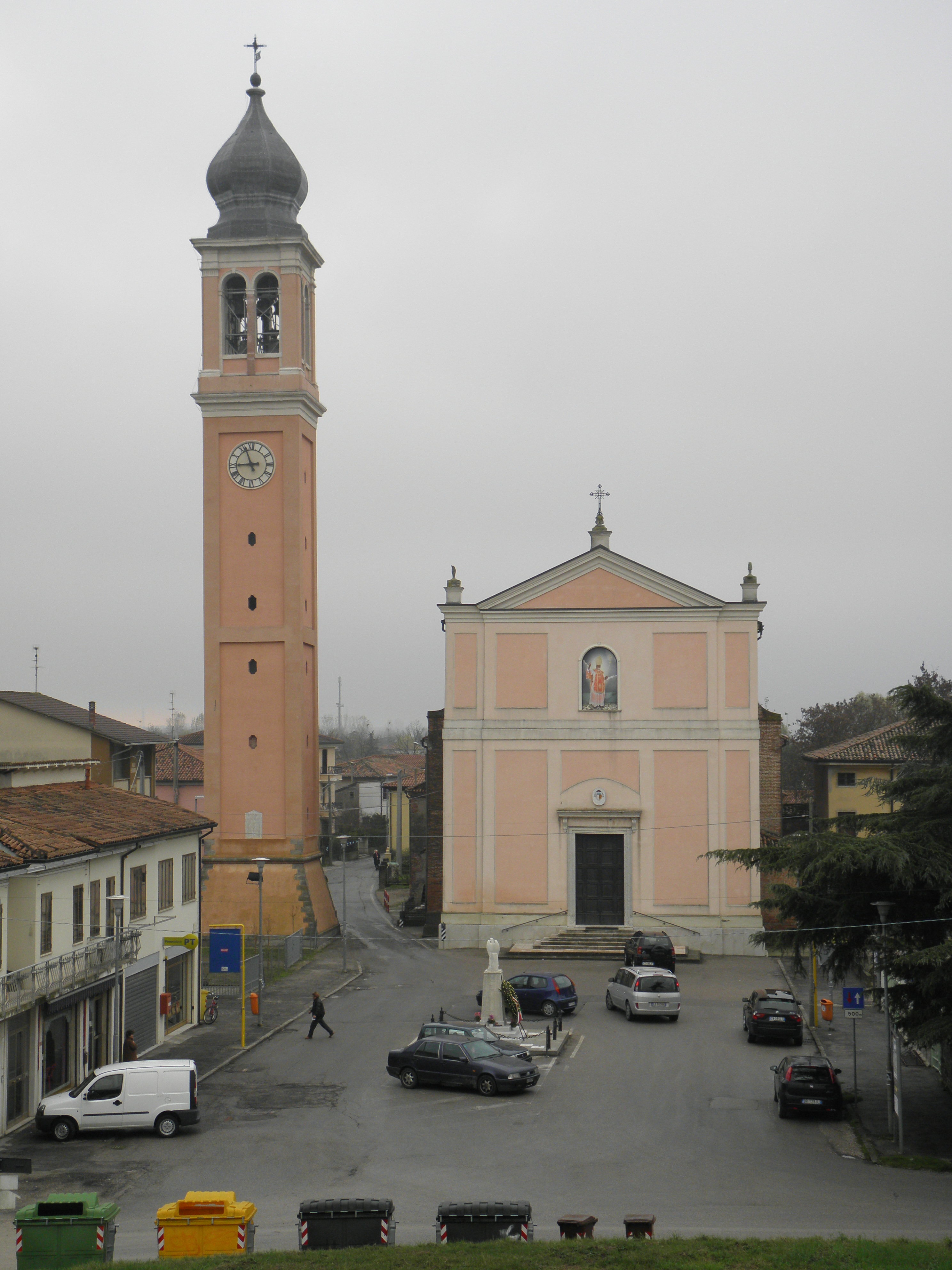 Chiesa parrocchiale di San Zenone vescovo (XVIII secolo), Boara Polesine, frazione di Rovigo, dopo il lavoro di restauro (2010).